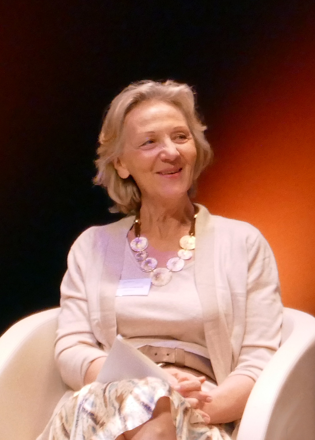 Ysé Tardan-Masquelier, au cours d'une table-ronde pendant les Assises nationales des enseignants de yoga (FNEY) à Troyes.